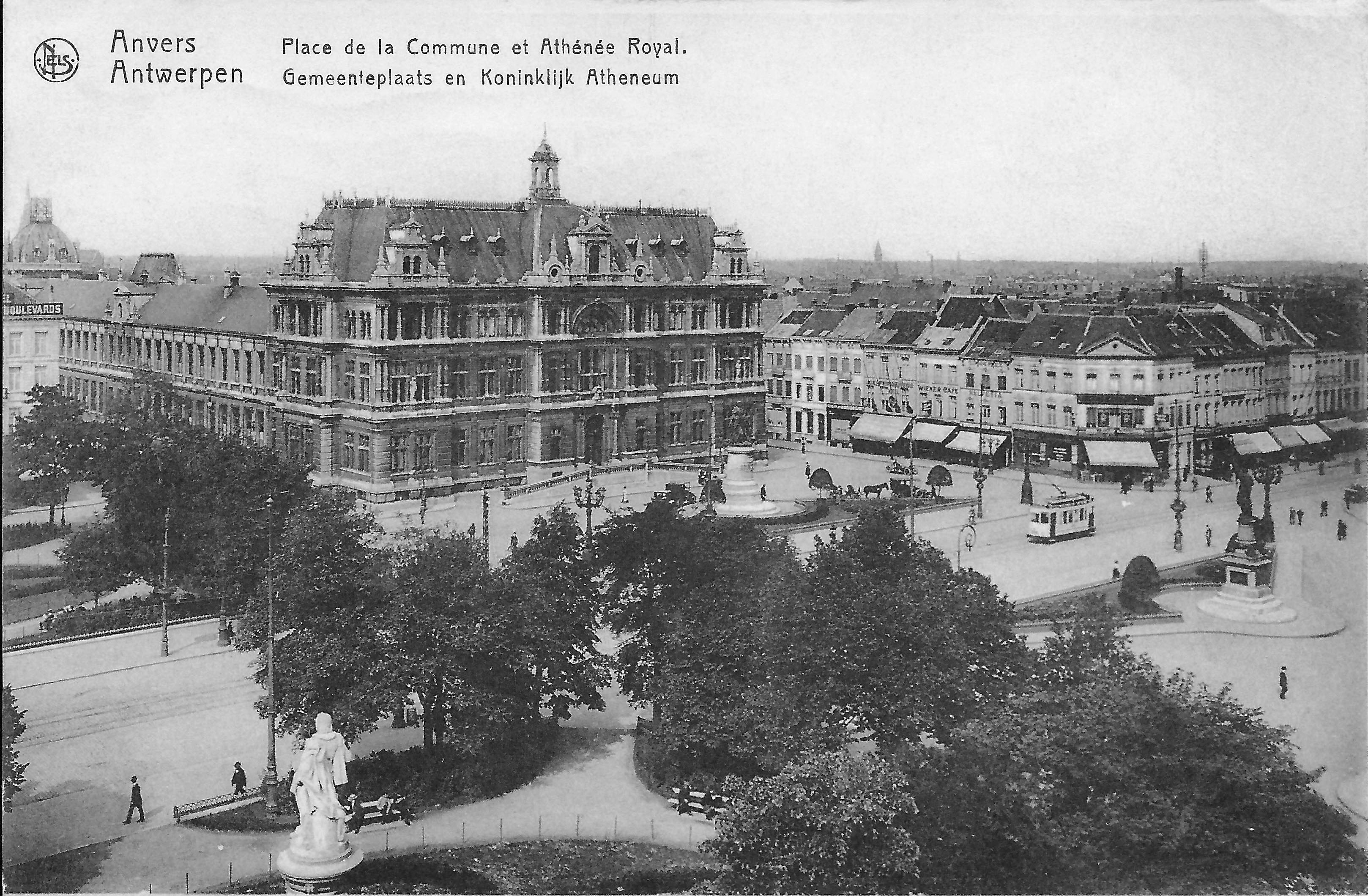 Koninklijk Atheneum in Antwerpen op de toemalige Gemeenteplaats (nu Rooseveltplaats).